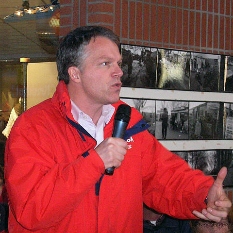 Wouter Bos, Dutch leader of the PvdA (Labour party) campaigning in Hengelo, November 17th 2006 Location: Hengelo (Overijssel), Netherlands --- nl: Wouter Bos, partijleider en lijsttrekker van de PvdA tijdens campagneoptreden in Hengelo (Overijssel) op 17 november 2006 Locatie: Winkelcentrum "Groot Driene", Hengelo (Overijssel) Trefwoorden: Partij van de Arbeid